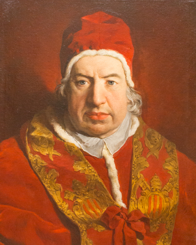 Pape Benoît XIV. Peinture de Pierre-Hubert Subleyras. Metropolitan Museum, New York.